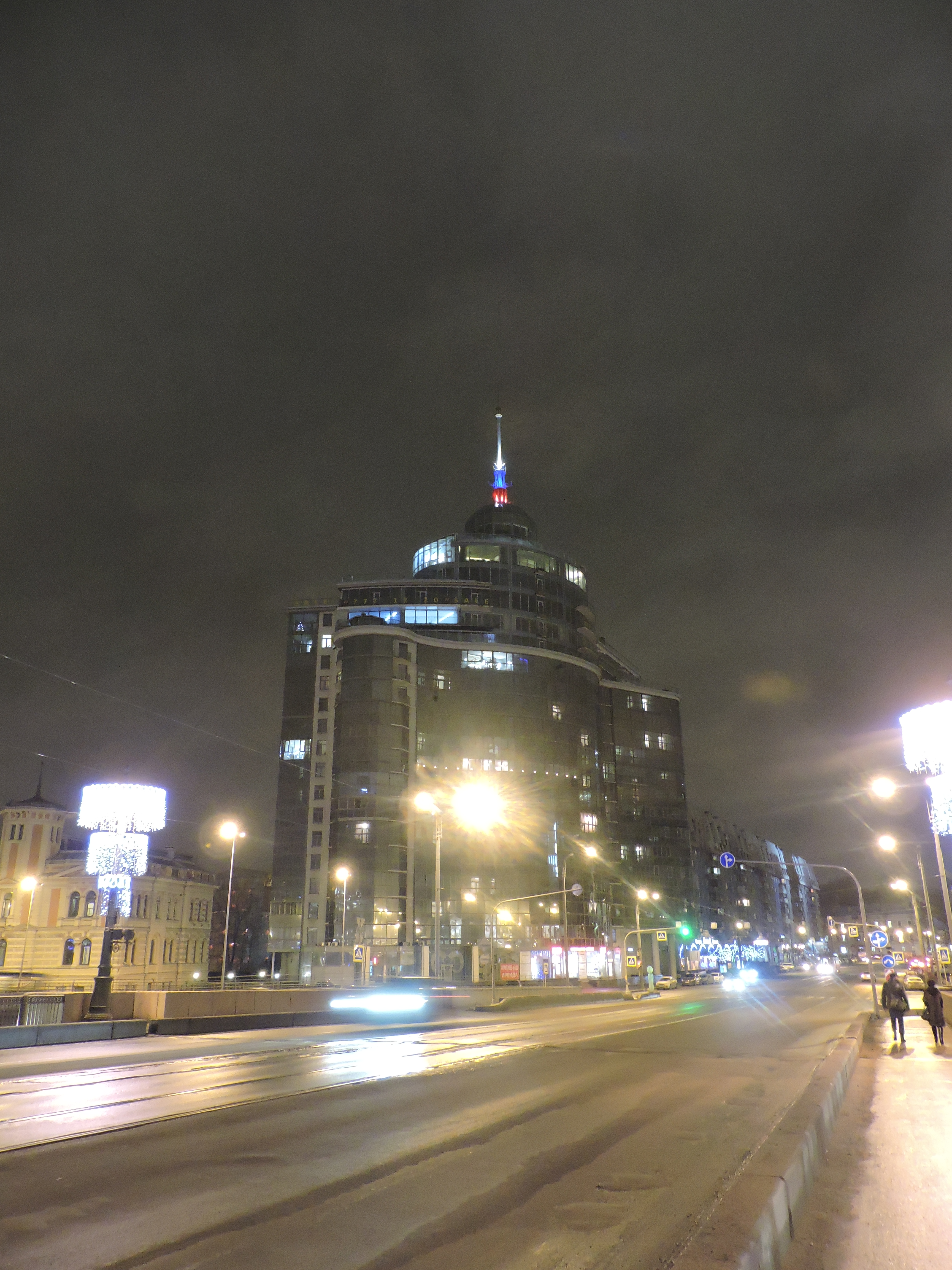 Высотка на Финляндском проспекте, угол Пироговской набережной